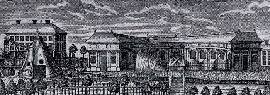 Ansicht des Neuen Packhofs in Berlin (mit Kran)